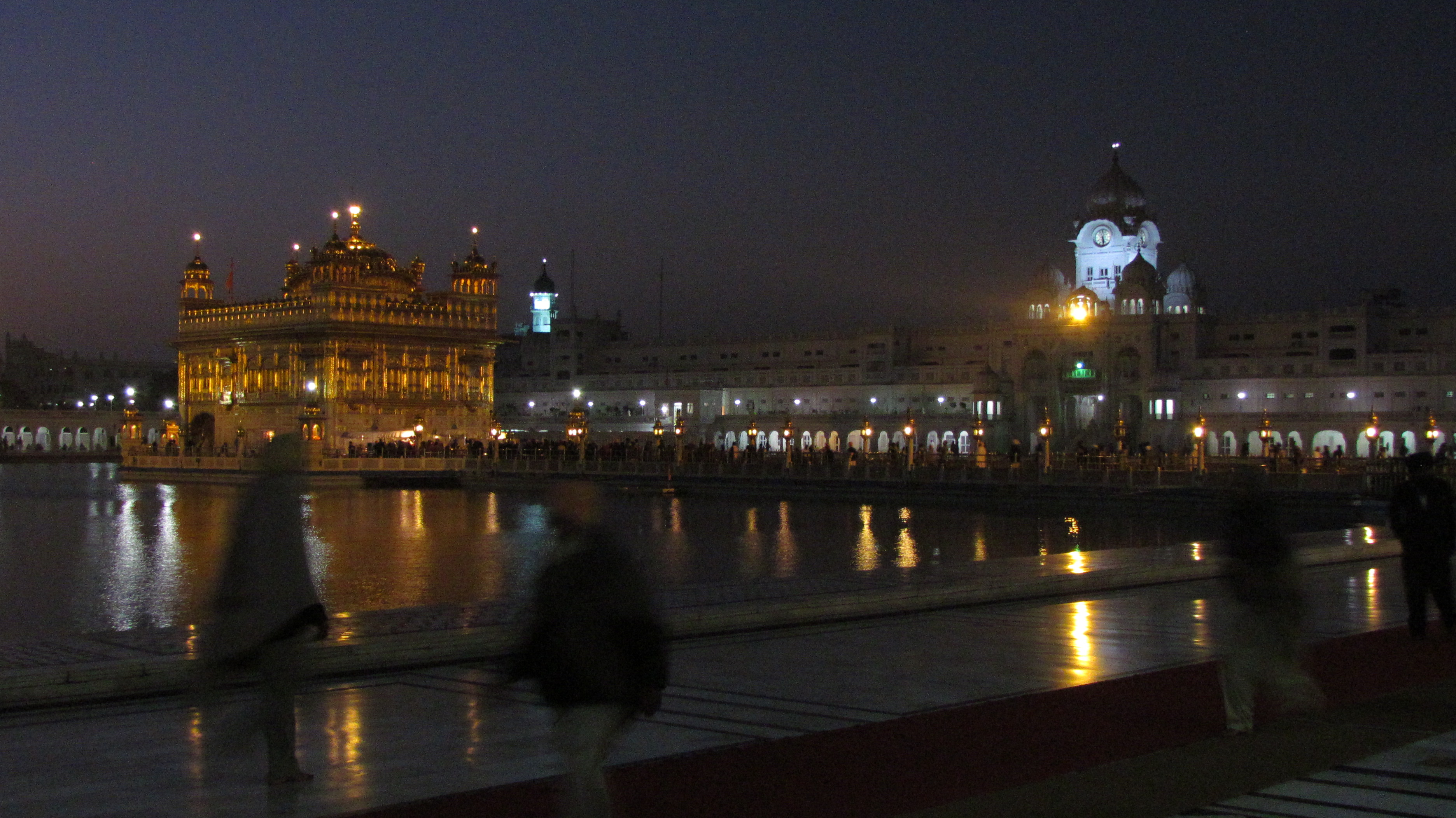 Golden Tempel, Shri harmandir sahib, Amritsar sahib